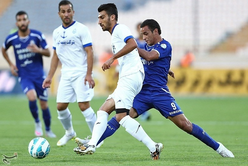 Esteghlal 2 - 0 Malavan